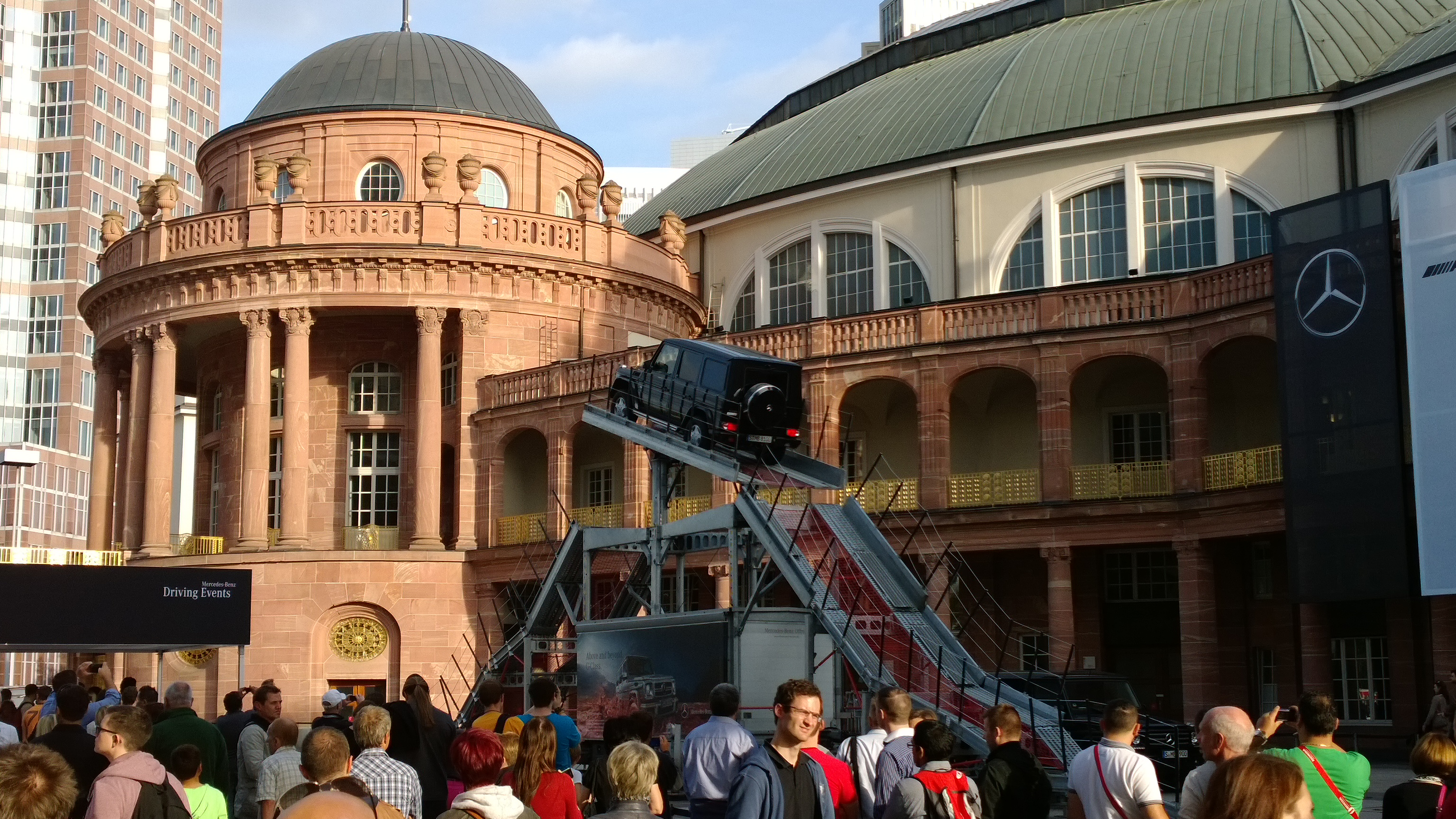 Vorführung der Steigfähigkeit mit einem schwarzen Mercedes-Benz W463 G500 (Modelljahr 2013) auf der IAA 2013 in Frankfurt am Main, Deutschland.